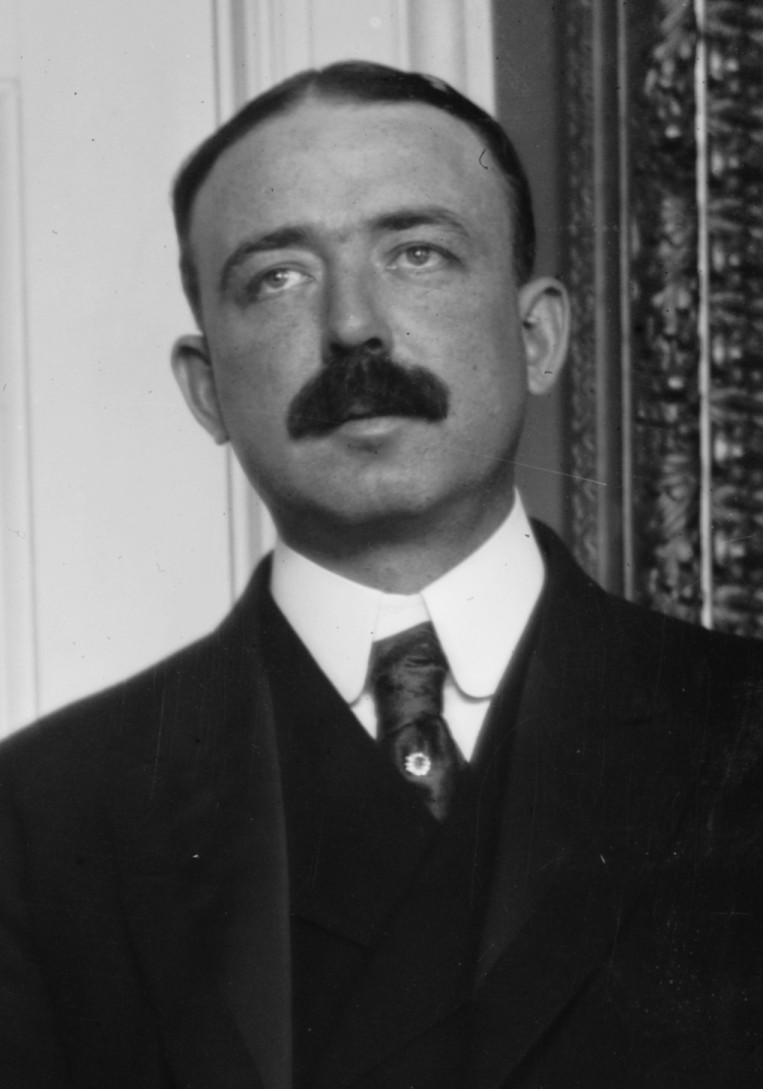 Bird Sim Coler